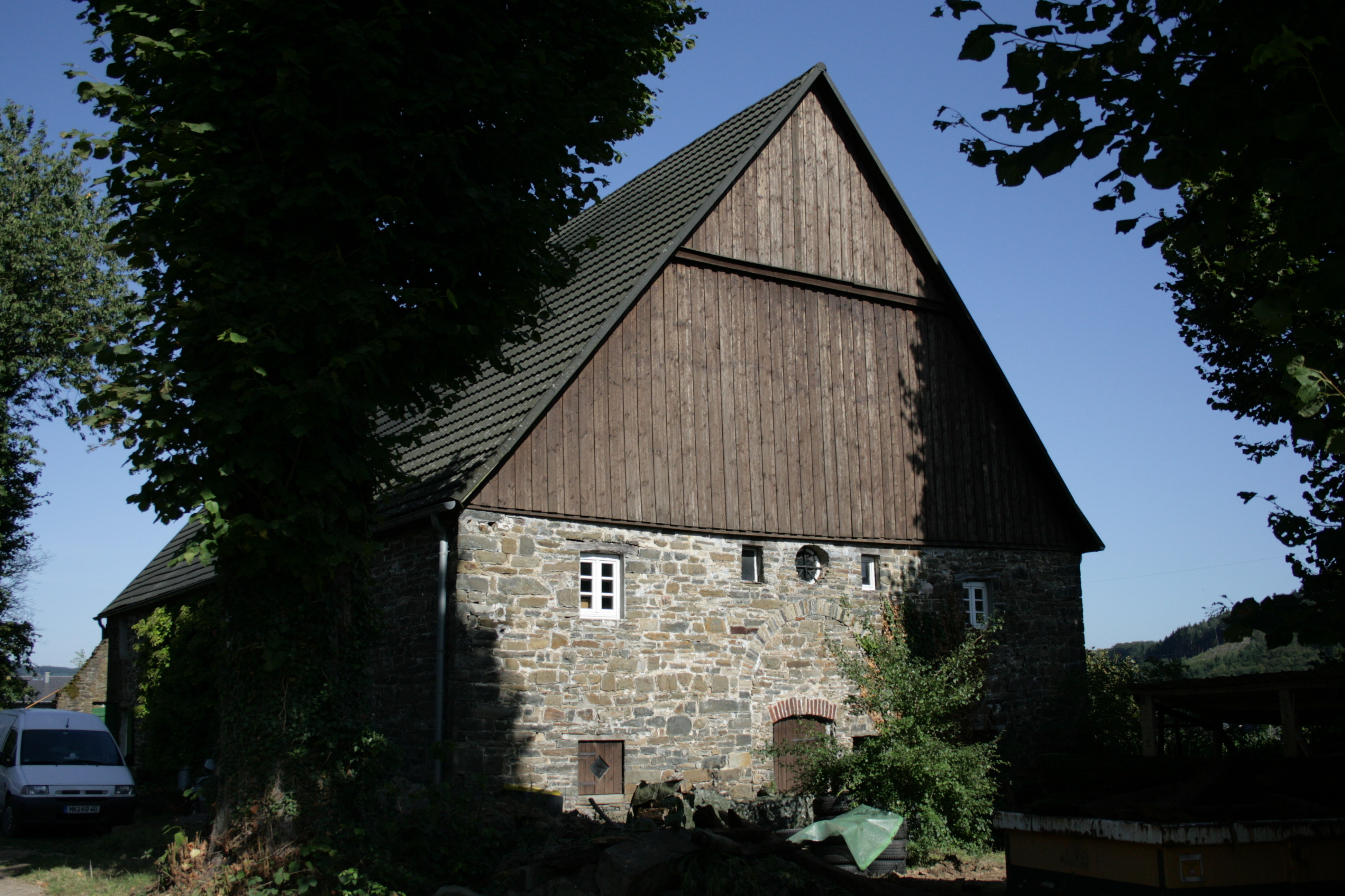 Alt Pungelscheid in Werdohl